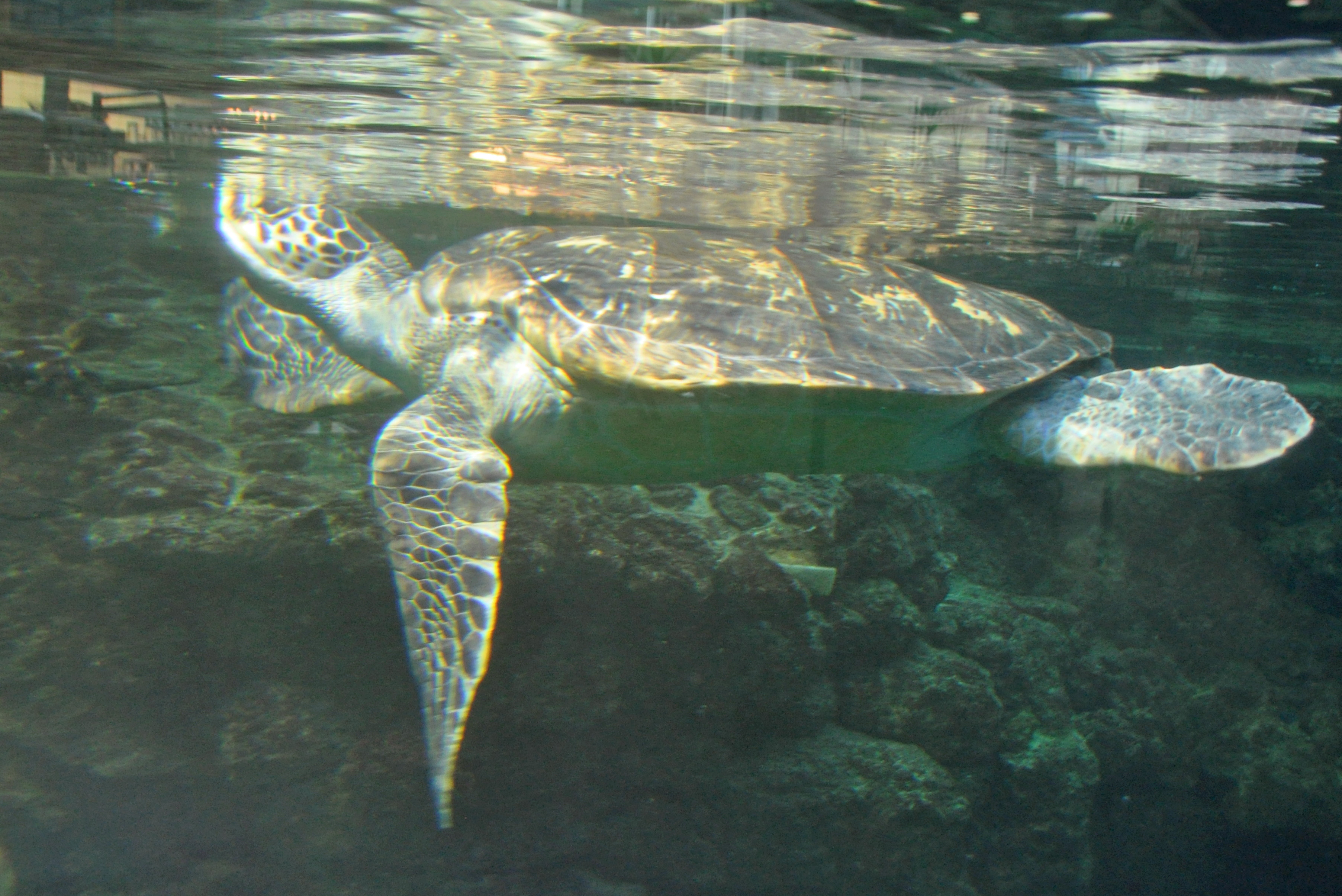 Stralsund, im Meeresmuseum (2013-02-13), by Klugschnacker in Wikipedia (33)